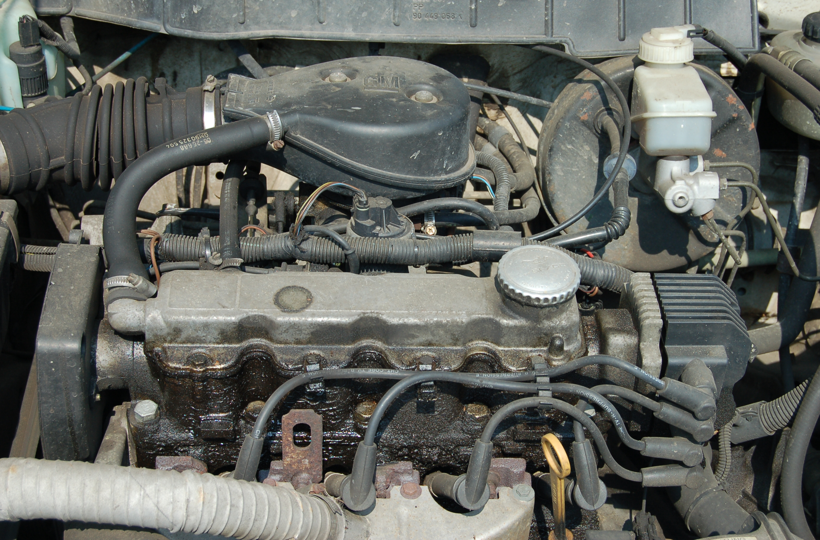 1.6 Liter-Motor eines Opel Astra F Caravan, Baujahr 1993, 75 PS und 258.000 Km gelaufen.